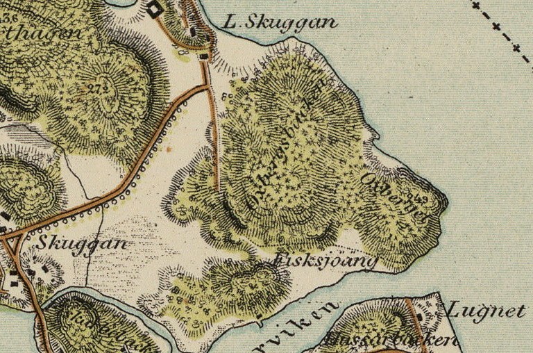 Del av "Trakten omkring Stockholm" visande Oxberget på Norra Djurgården